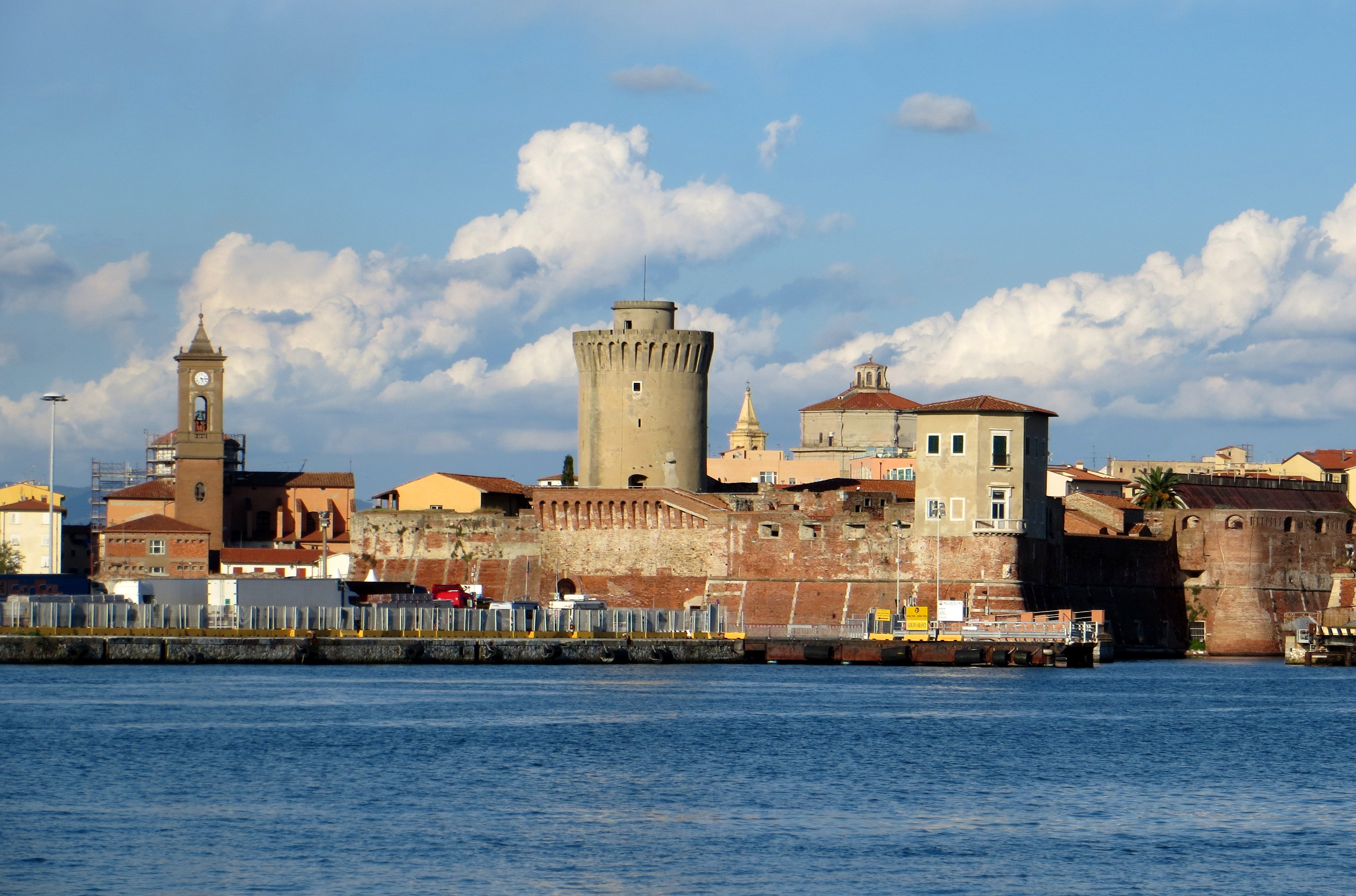 Panorama di Livorno dal Molo Mediceo: a sinistra il campanile della Chiesa di San Ferdinando, poi il Mastio di Matilde e il campanile e la cupola di Santa Caterina